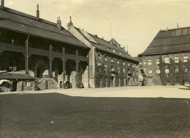 Schlossplatz in Königsberg